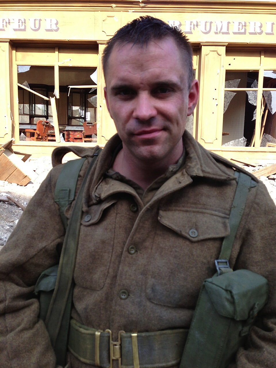 Joe Tödtling als britischer Soldat am Set von "The Monuments Men"